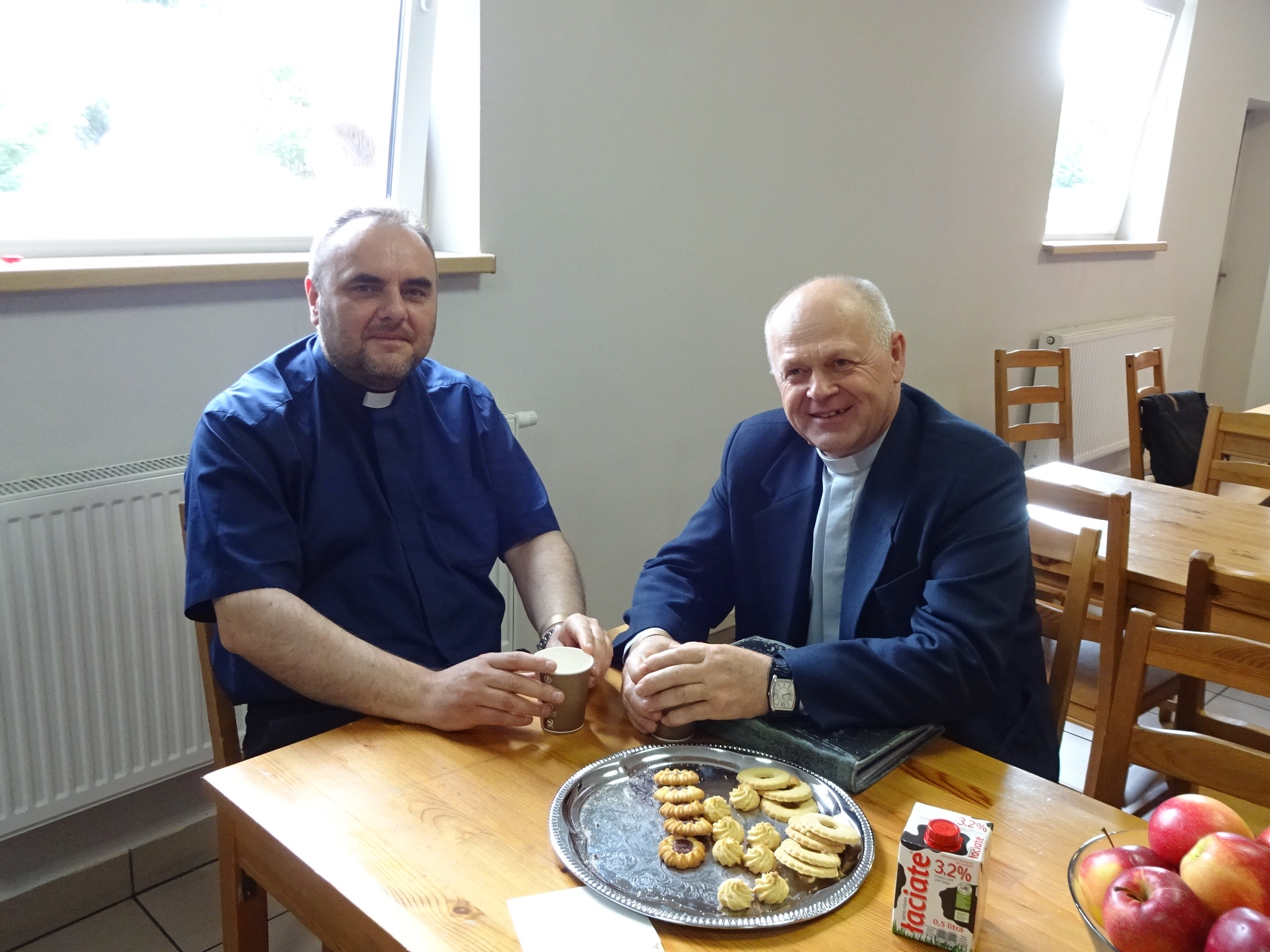 Jozef Bartos oraz Ryszard Kwoka na konferencji "Na falach Ducha", WSTS, 2019-06-04